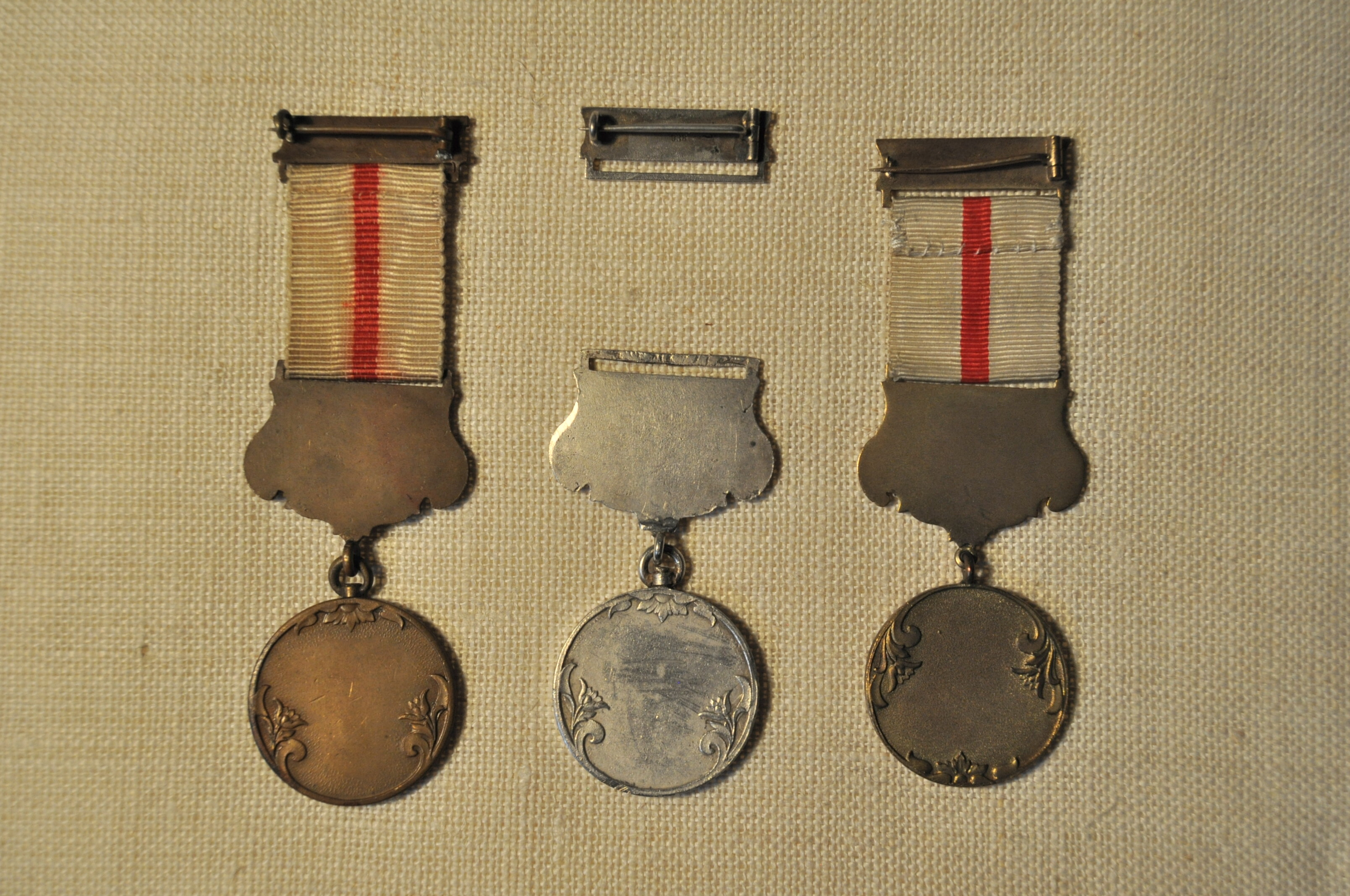 Verdienstmedaillen vom Roten Halbmond in Bronze, Silber und Gold (vlnr) Rückseite.